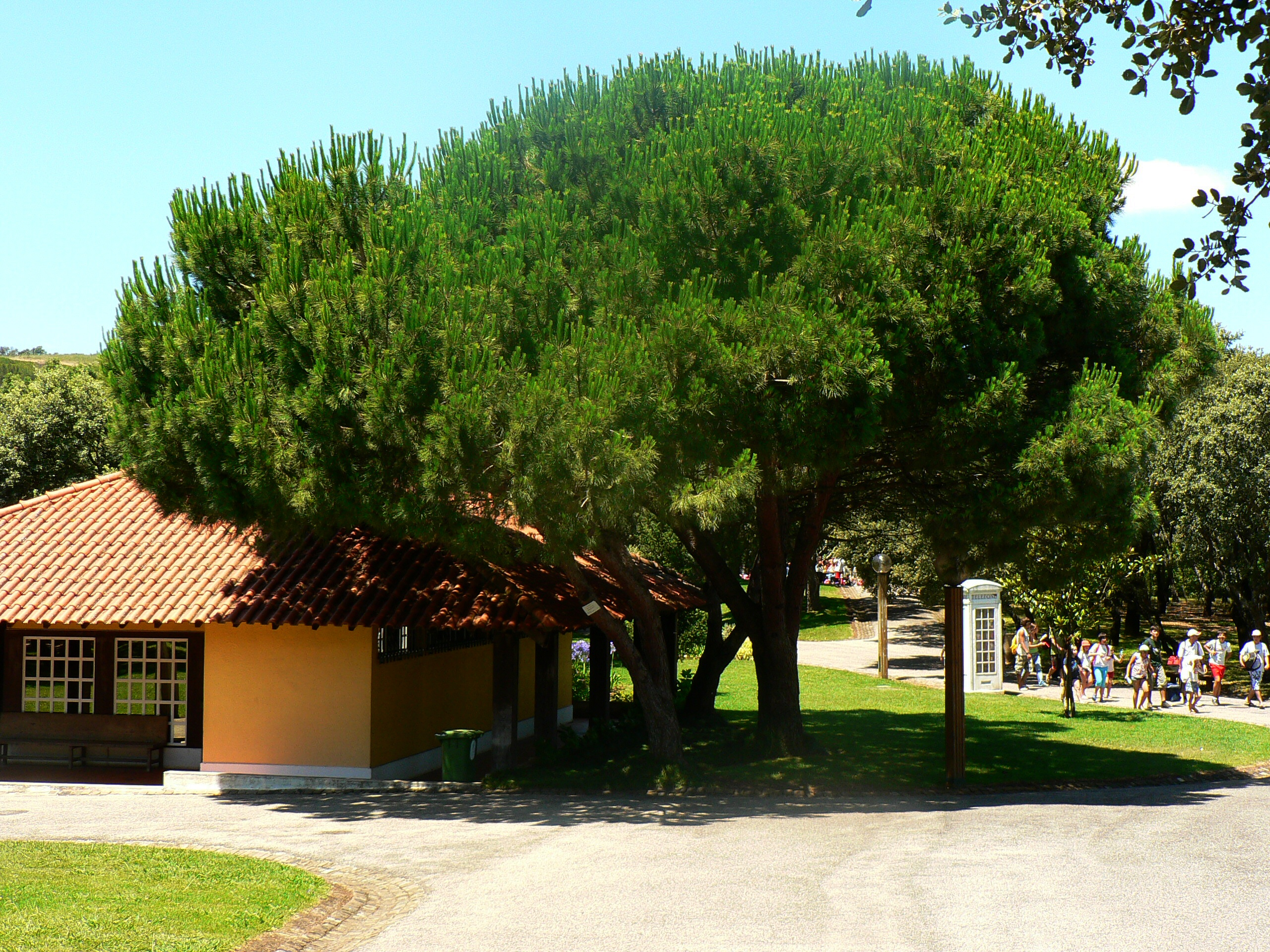 Pinheiro manso no Parque da Serafina em Lisboa